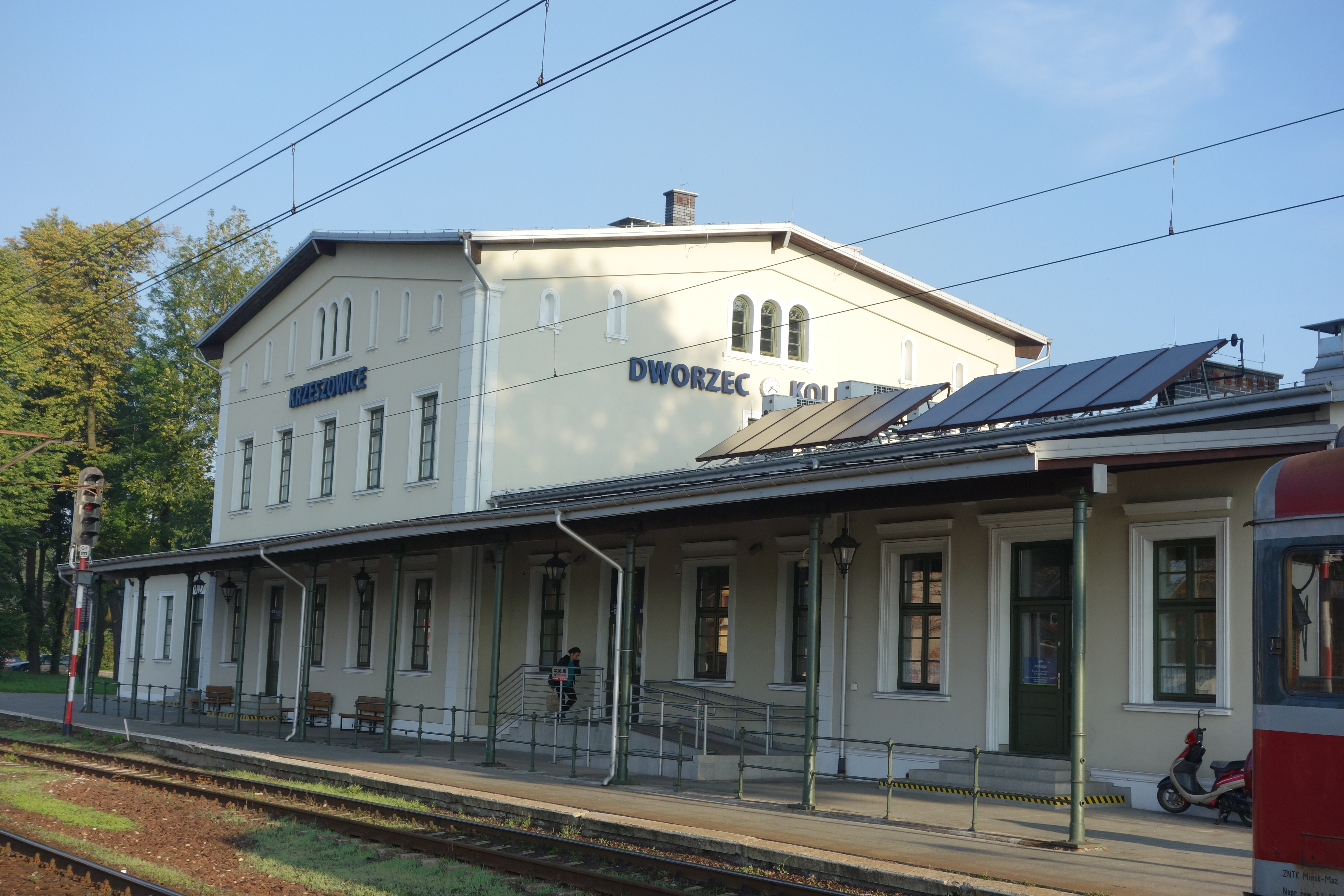 Krzeszowice - dworzec kolejowy This photo was taken during Railway Wikiexpedition 2014 set up by Wikimedia Polska Association. You can see all photographs in category Wikiekspedycja kolejowa 2014. English | Polski | +/−